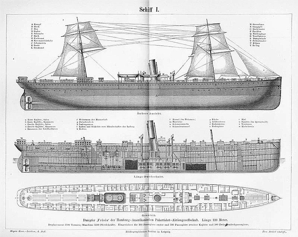 Dampfschiff Frisia